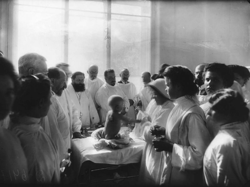 Введение препарата «606» грудному ребенку, страдающему врожденным сифилисом